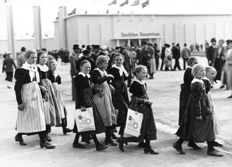 München, Reichsnährstand-Ausstellung, Kindergruppe München-Theresienwiese.- Ausstellung des Reichsnährstandes. Gruppe von Kindern (Mädchen) mit Taschen